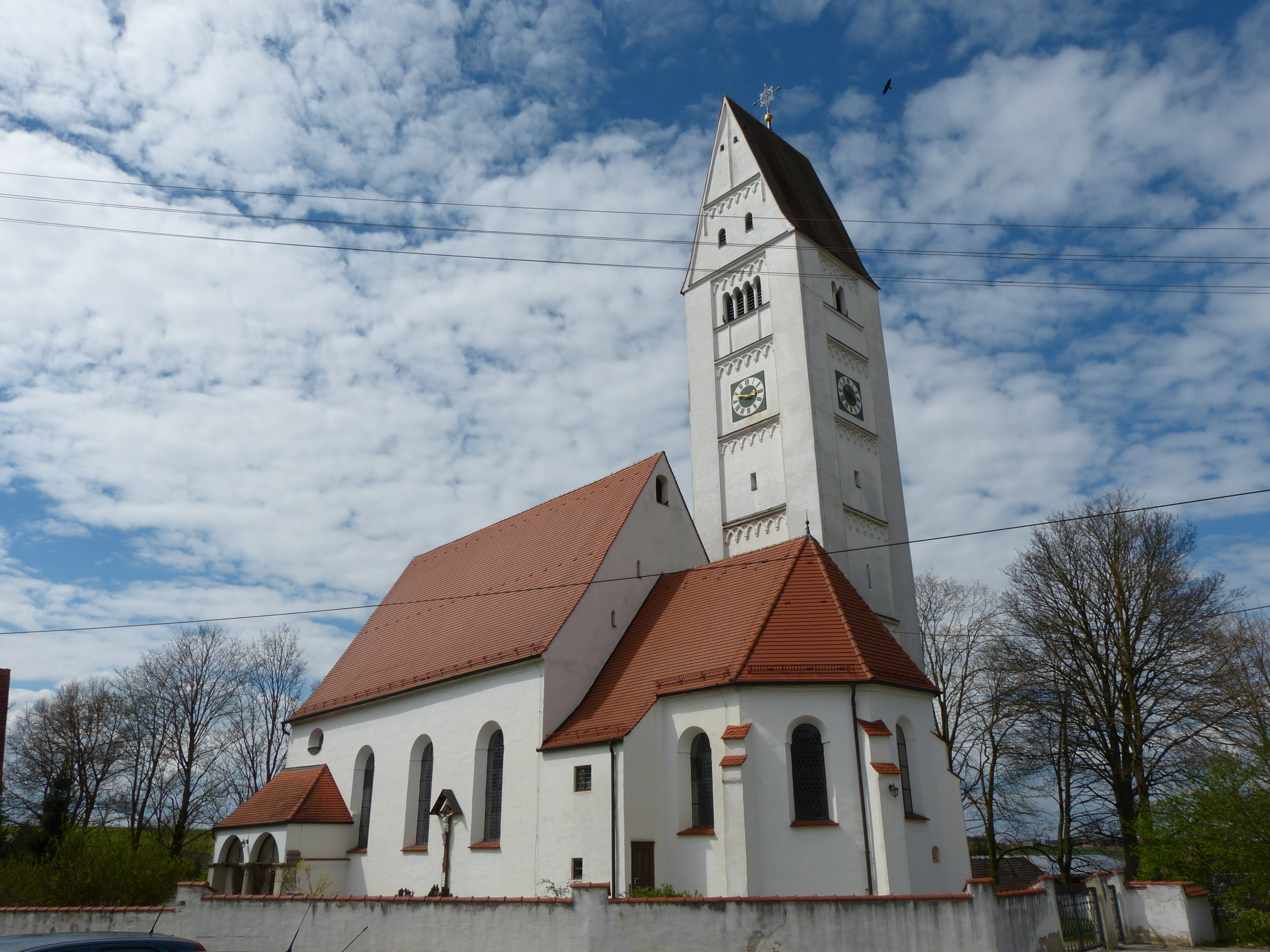 St. Michael, Eppishausen, Landkreis Unterallgäu, Bayern